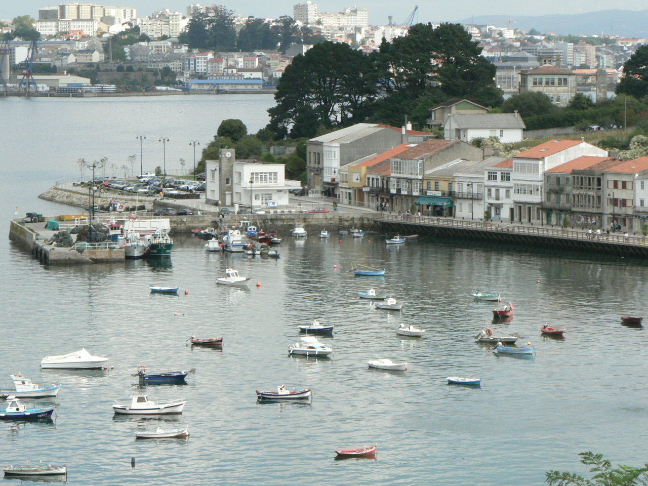 Information Description=Le petit port de Mugardos (A Coruña) Source=Propia Date=27/02/2008 Author=Basilio (d) 27 février 2008 à 20:30 (CET) other_versions=Non